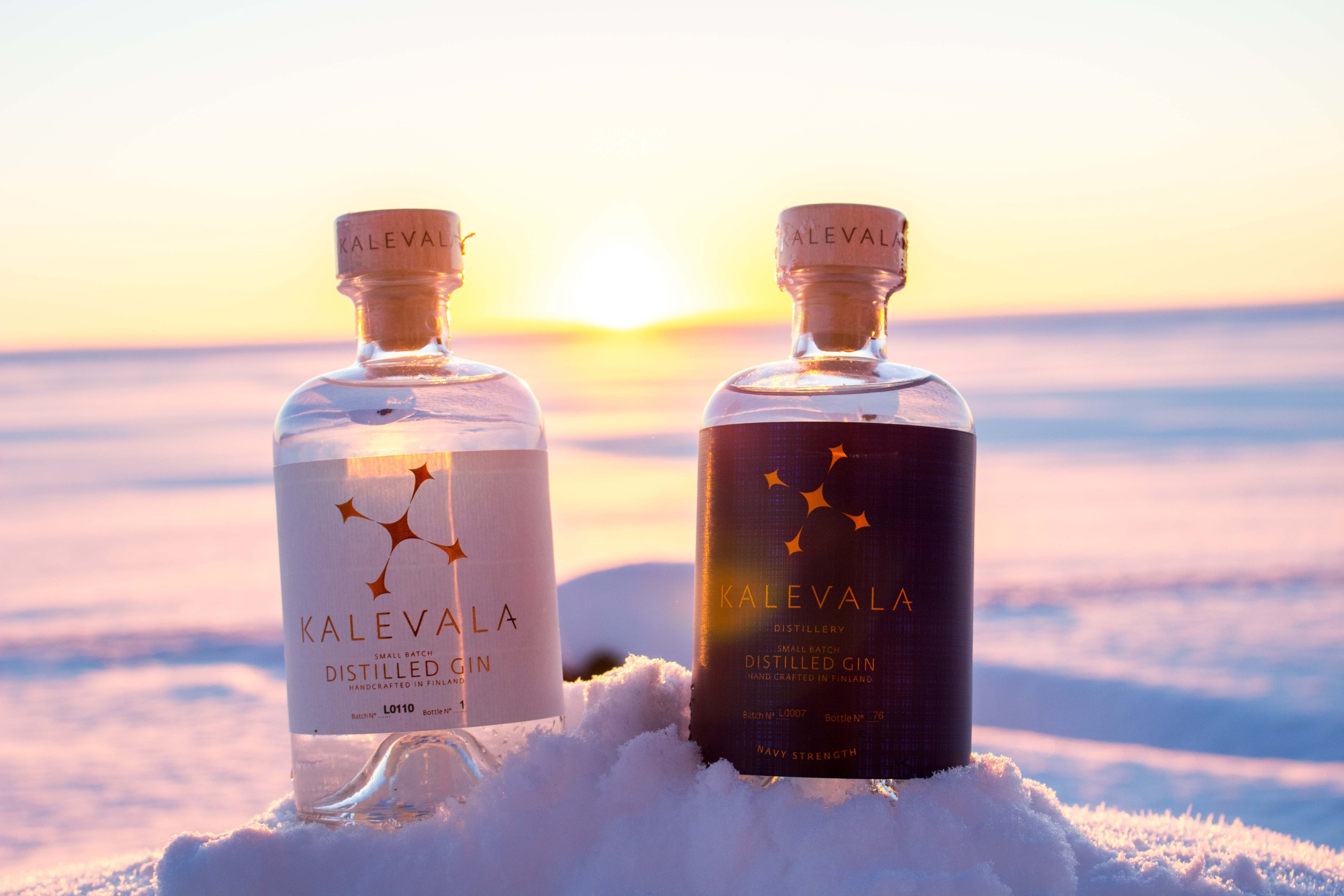 Kalevala Gin & Kalevala Blue Label (Navy Strength)